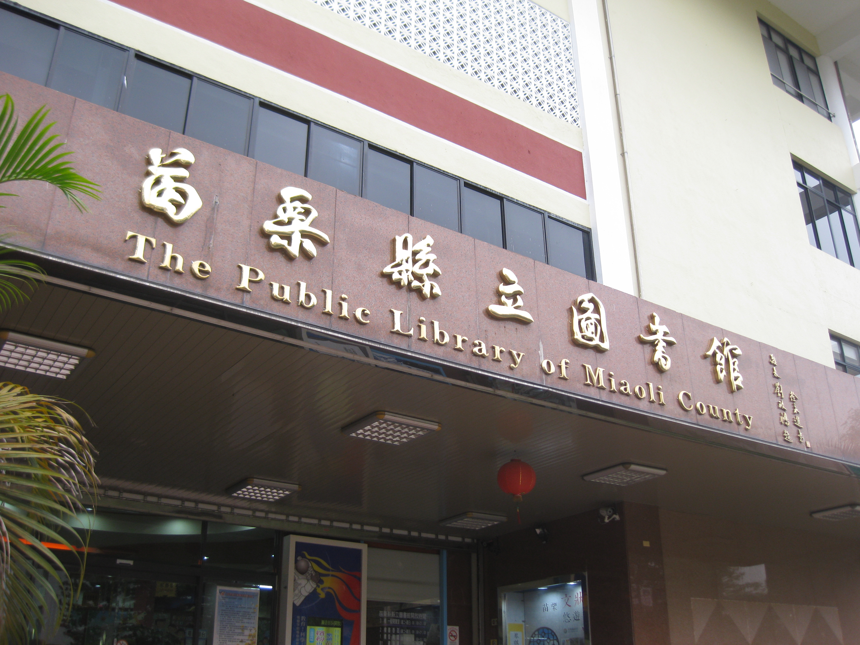 苗栗縣立圖書館大門